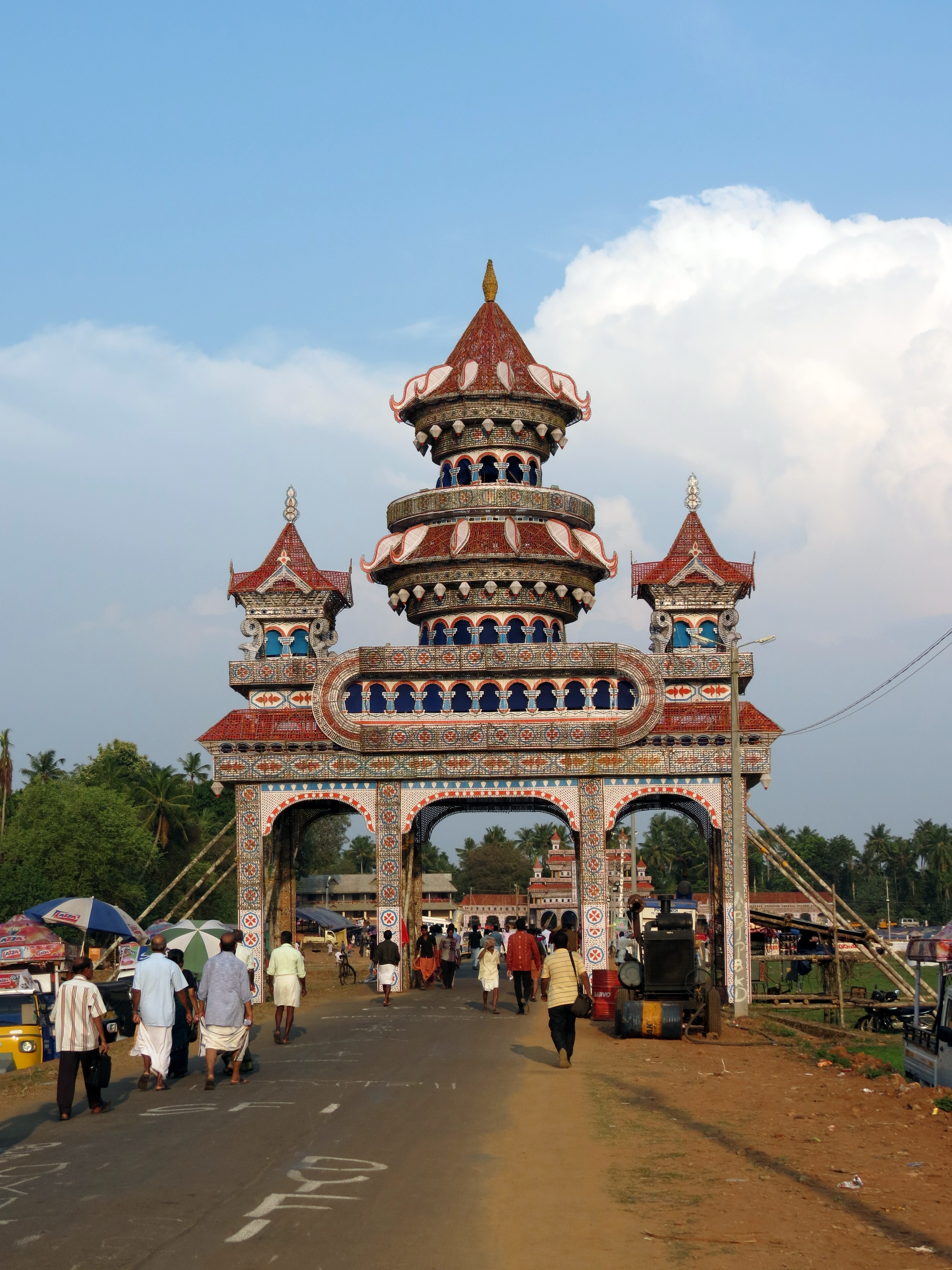 2013 Arattupuzha Pooram views